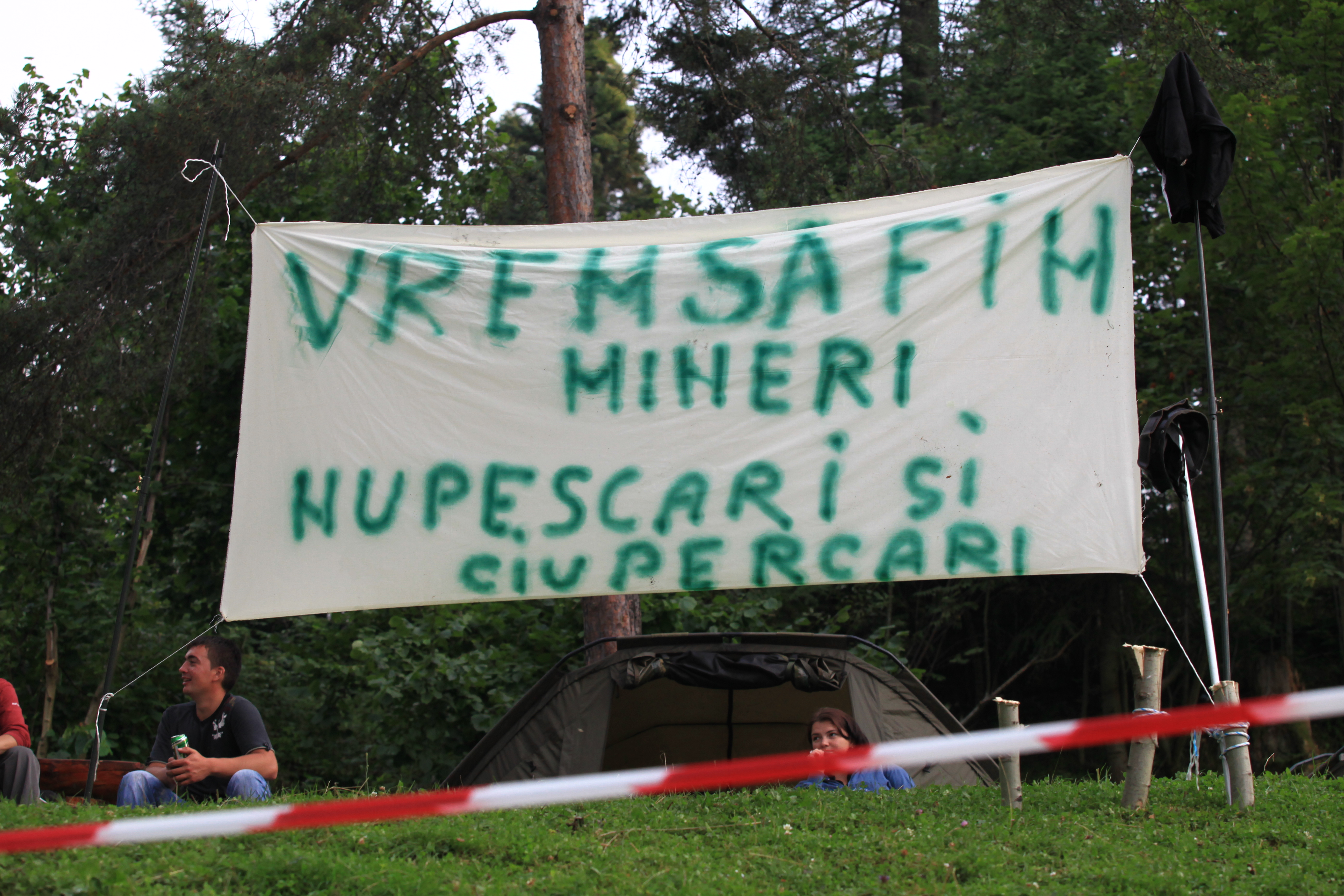 Peste 80% din localnici susțin și își doresc proiectul minier, iar festivalul a fost un prilej pentru ca ei să arate asta